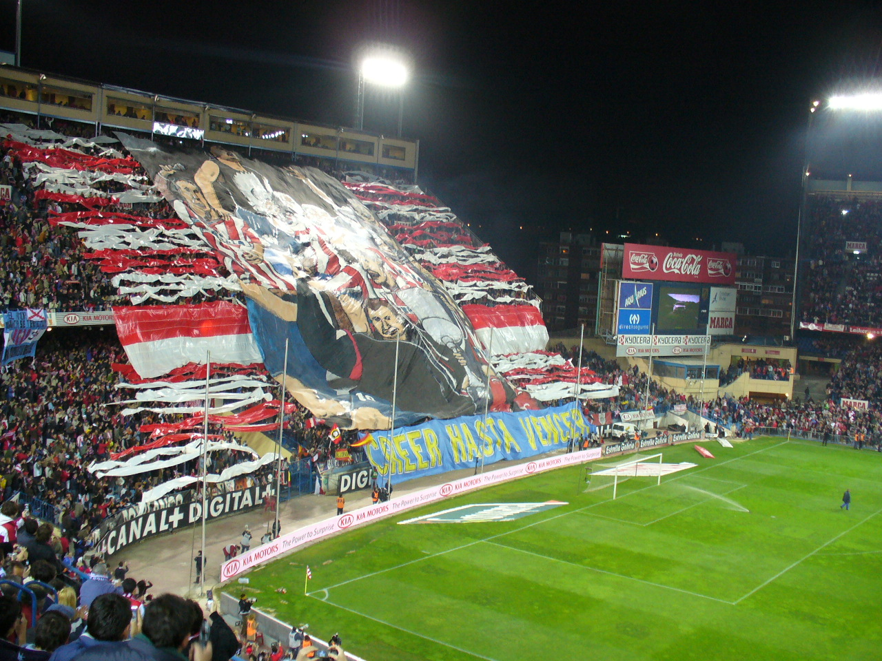 Atletico de Madrid 1 X 1 Real Madrid. Estádio Vicente Calderón